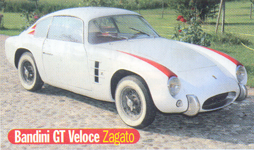 Bandini 750 GT Zagato